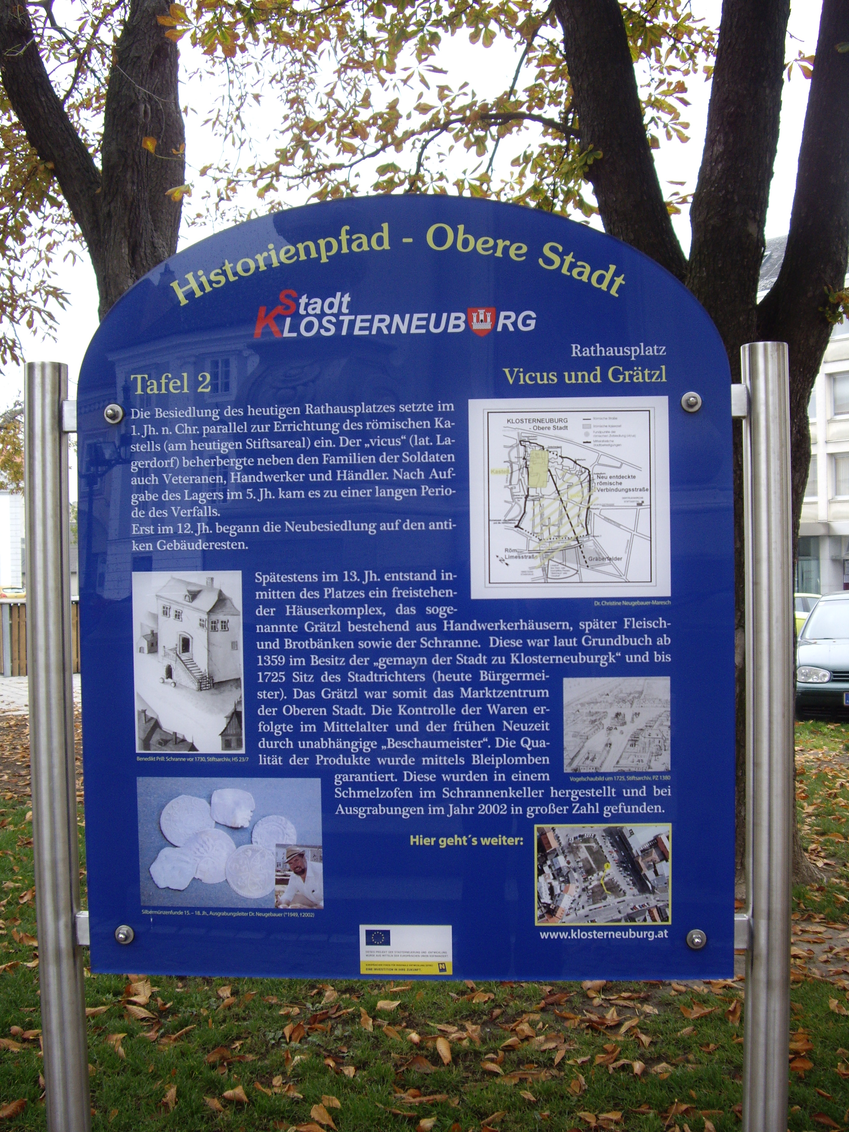 Pado de Historioj – Supera Urbo: Urboplaco tabulo 2 Vicus kaj Grätzl (malnovaj urbokvartaloj)